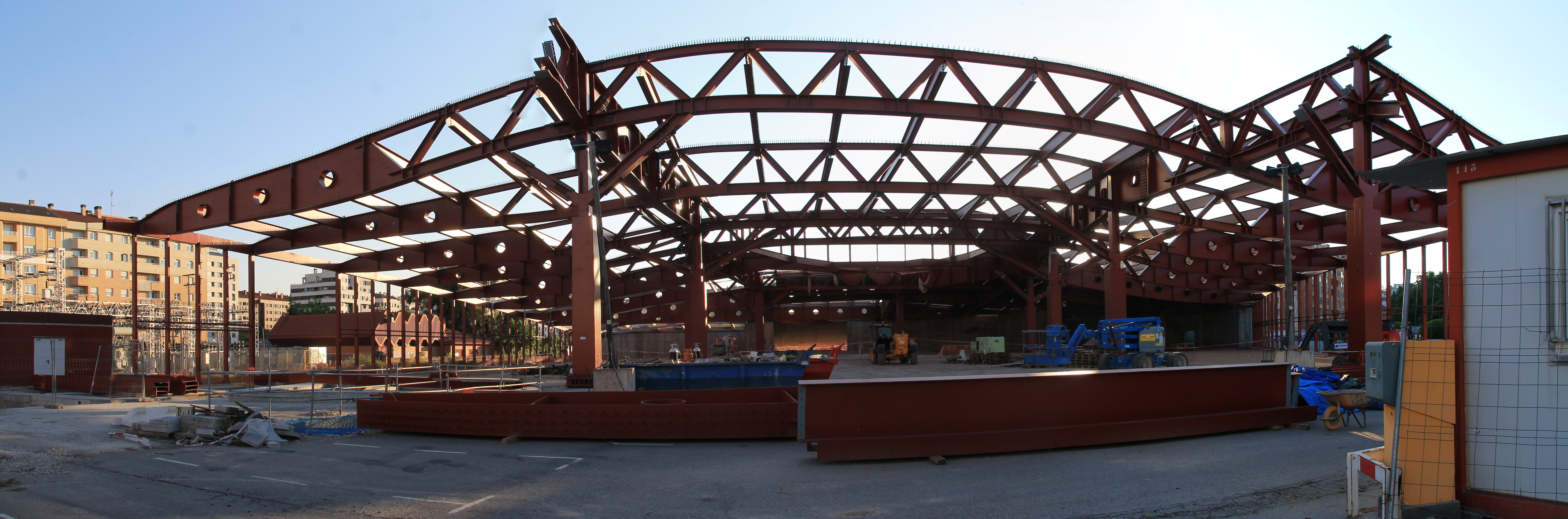 Construccion de la estacion de autobuses en Logroño